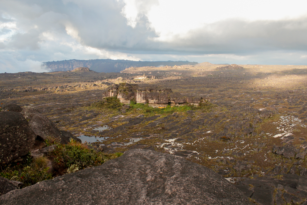 Hotel Principal, no topo do Monte Roraima, visto do Maverick